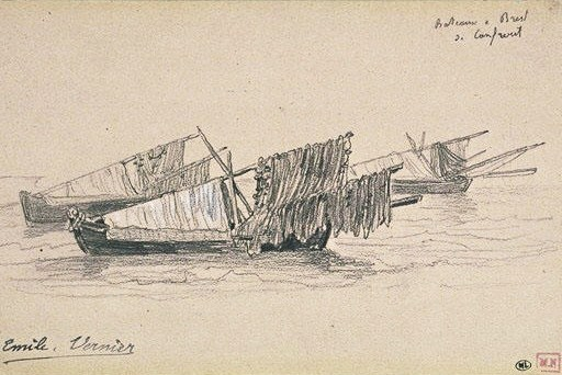 Trois barques de pêche avec leurs filets séchant, à Camfrout, près de Brest (par Emile Louis Vernier, musée du Louvre département des Arts graphiques)